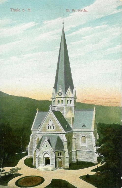 St. Petrikirche in Thale (1908)